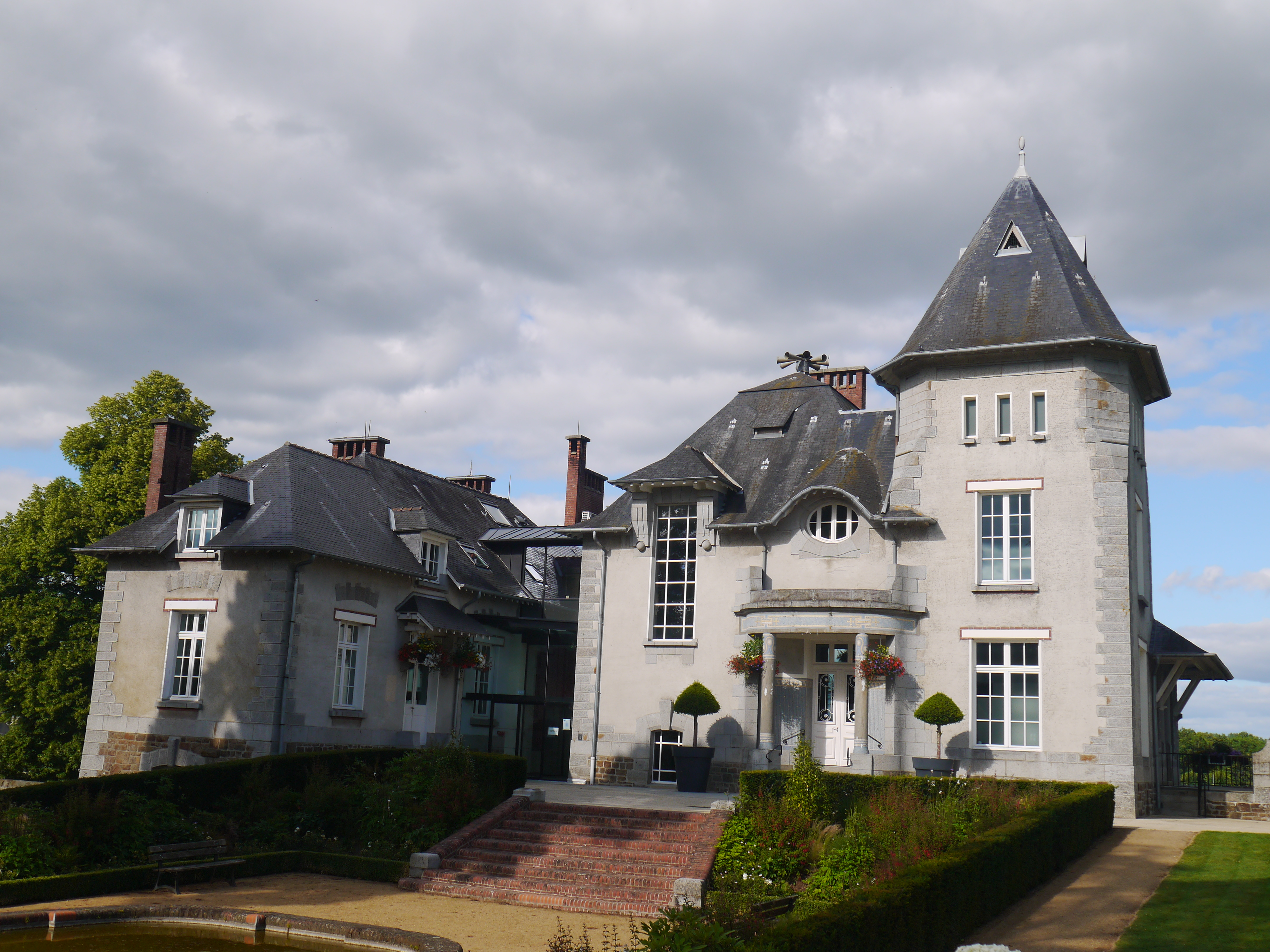 L'hôtel de ville.